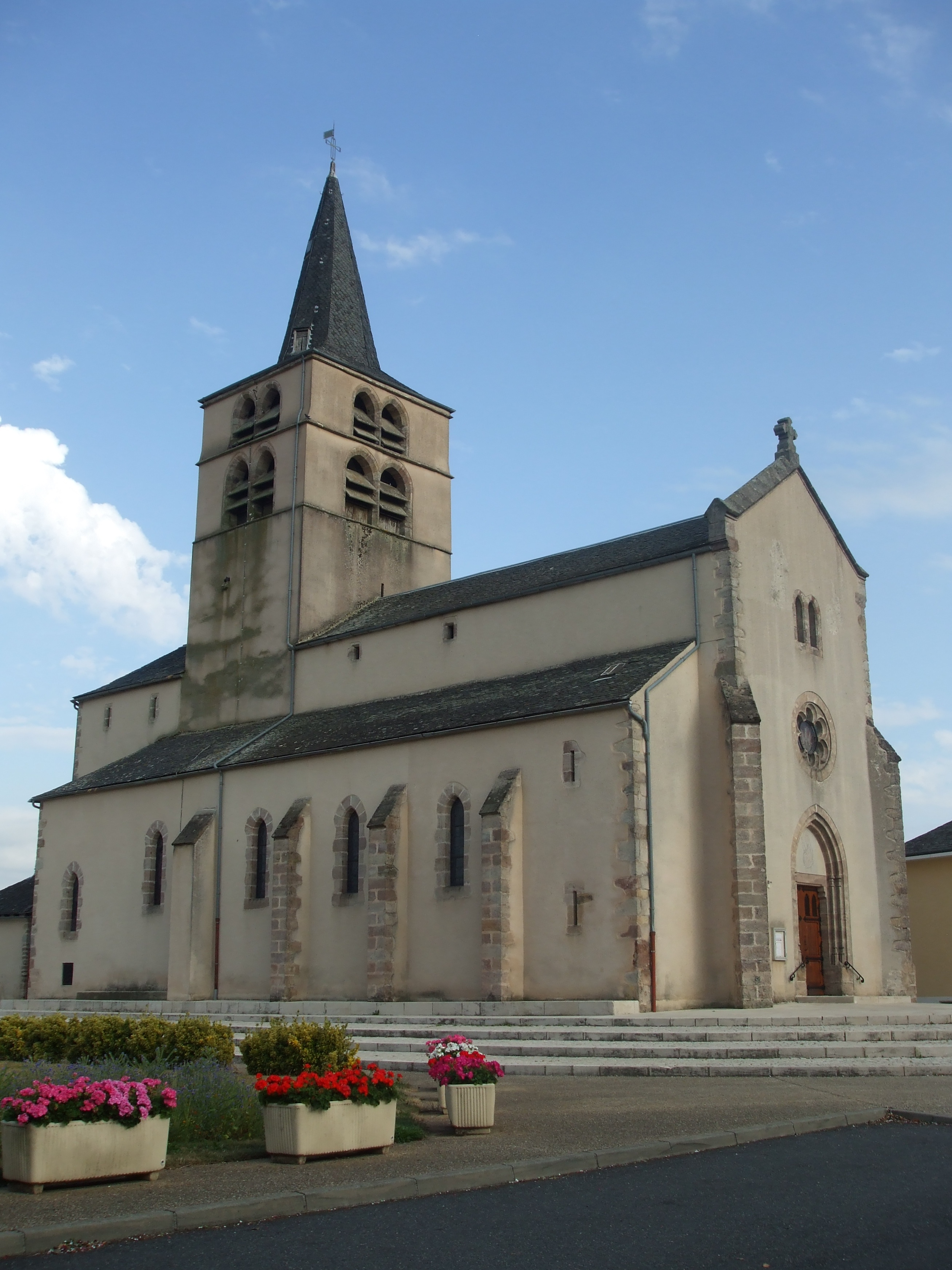 L'église de Luc-la-Primaube (Aveyron).